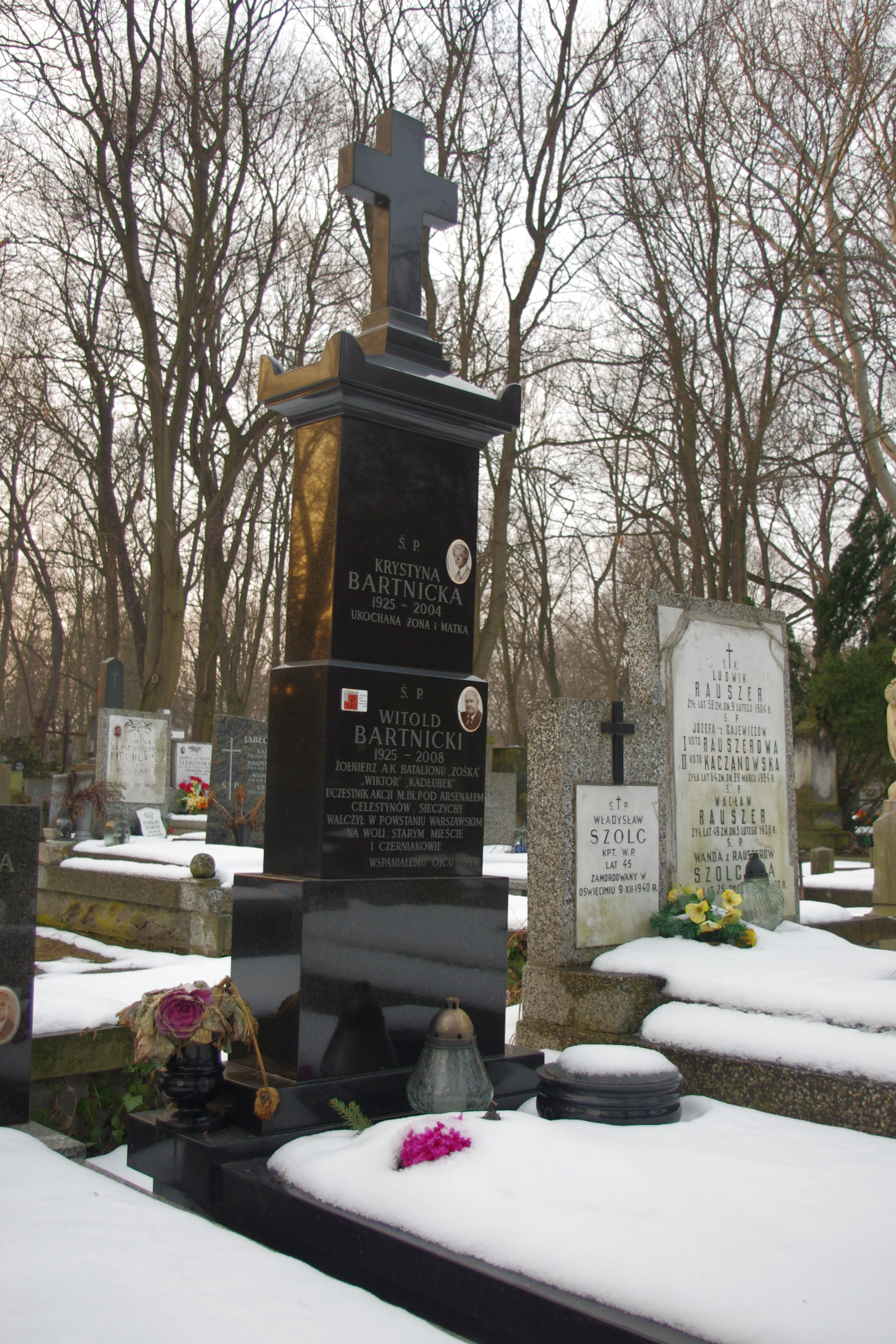 Grób Witolda Bartnickiego (1925-2008) - żołnierza AK, uczestnika akcji pod Arsenałem, na Cmentarzu Powązkowskim w Warszawie